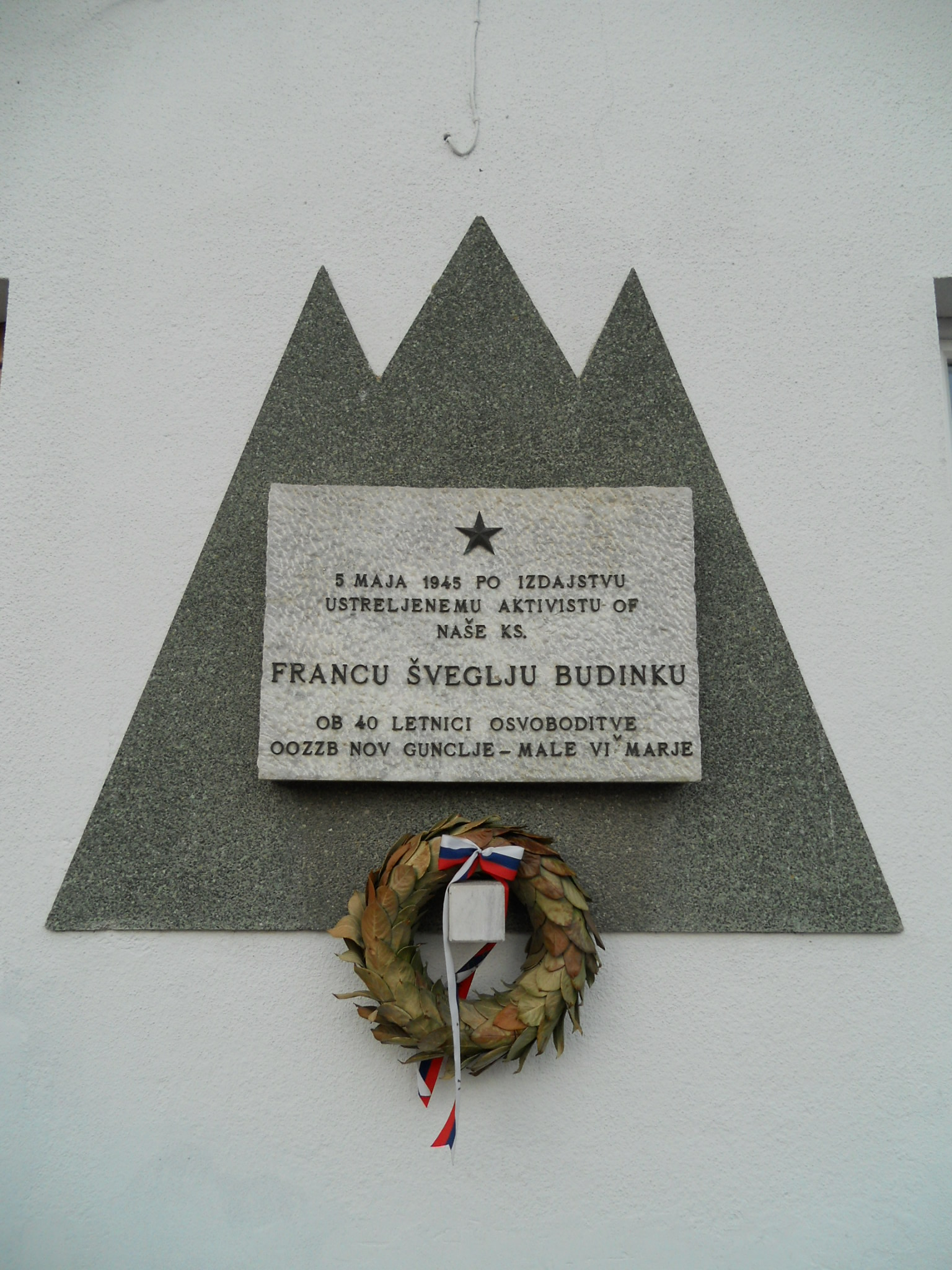 Spominska plosca Budniku